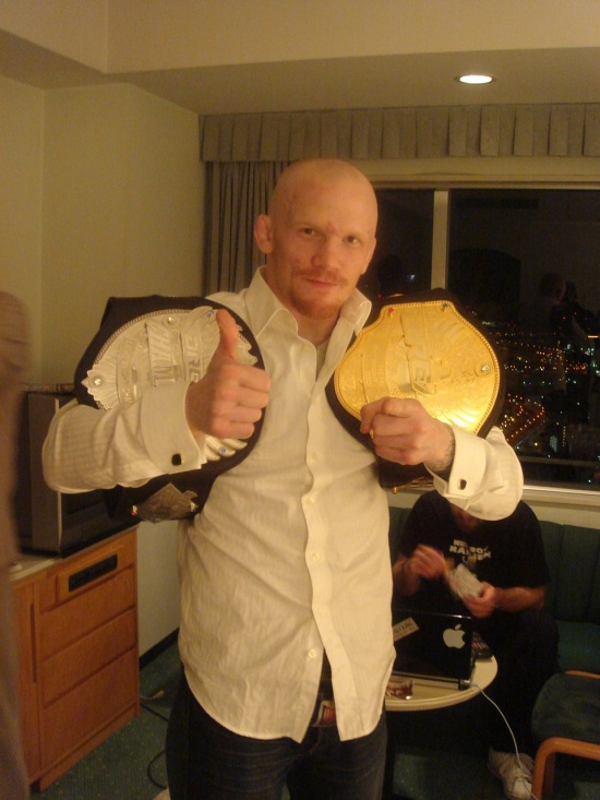 Joachim Hansen.